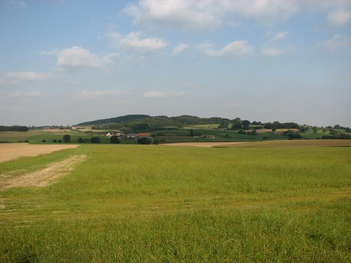 Kemmelberg mountain